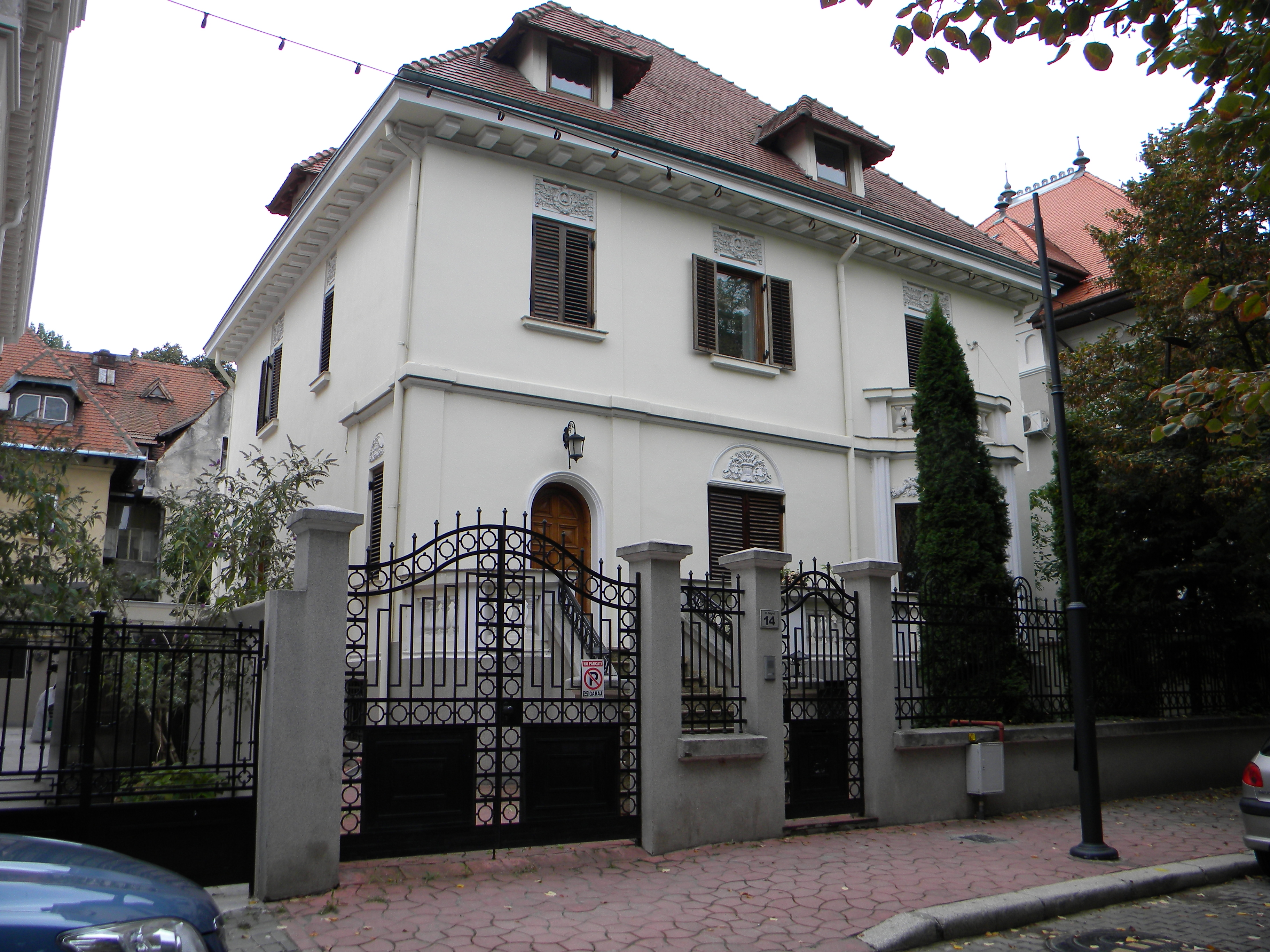 Bucuresti, Romania, Strada Belgrad nr. 14 (Casa); B-II-m-B-18124